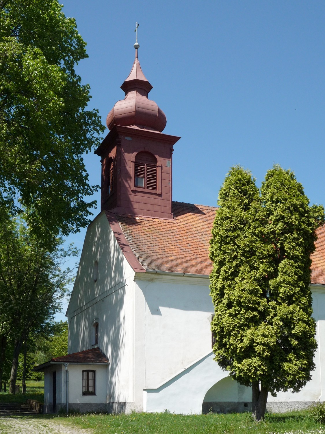 Toleranční modlitebna z roku 1786 v Horních Dubenkách.